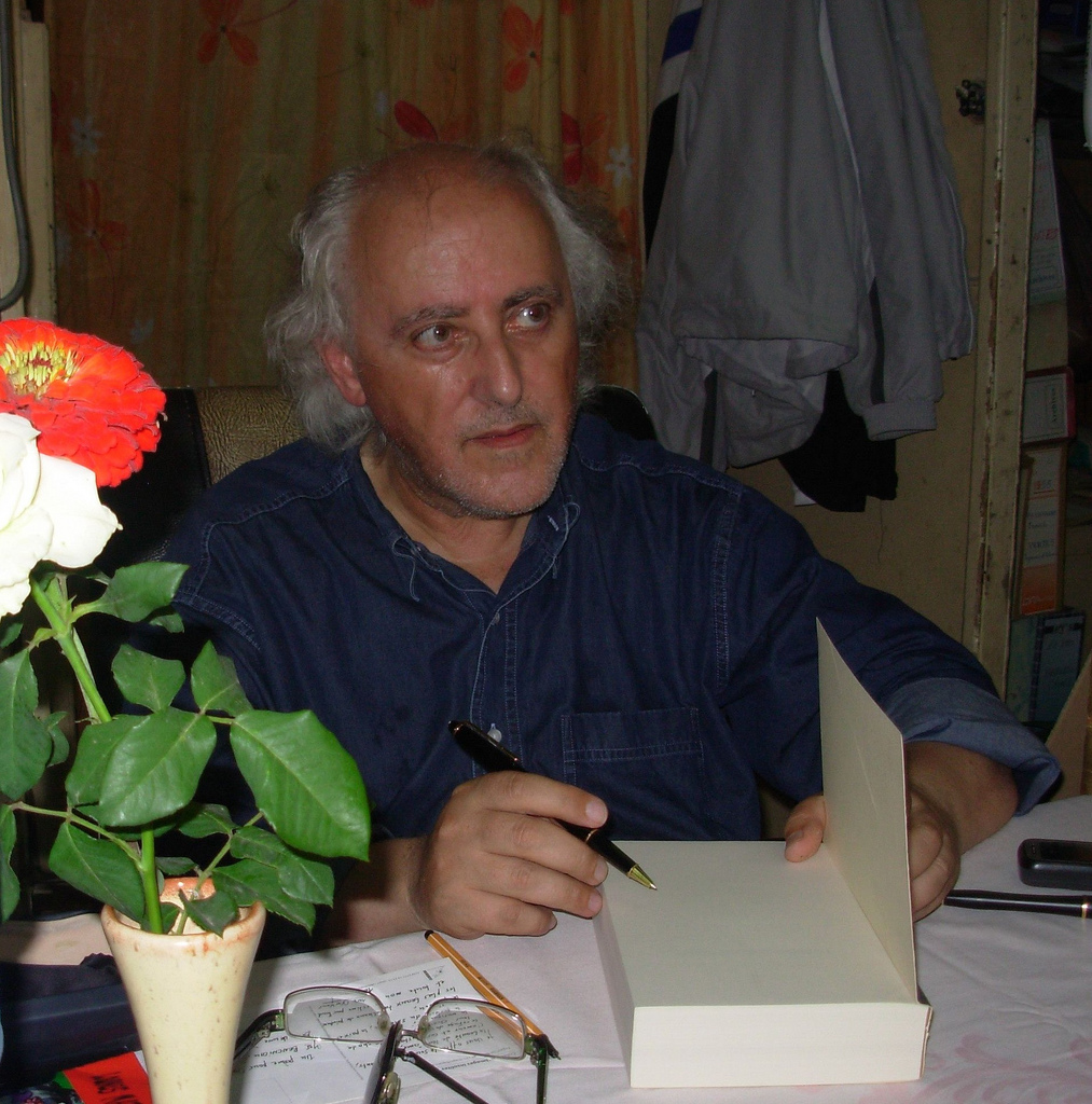 Béjaia le 21 juillet 2011 - Mohamed Benchicou pendant la vente dédicace de son dernier livre.